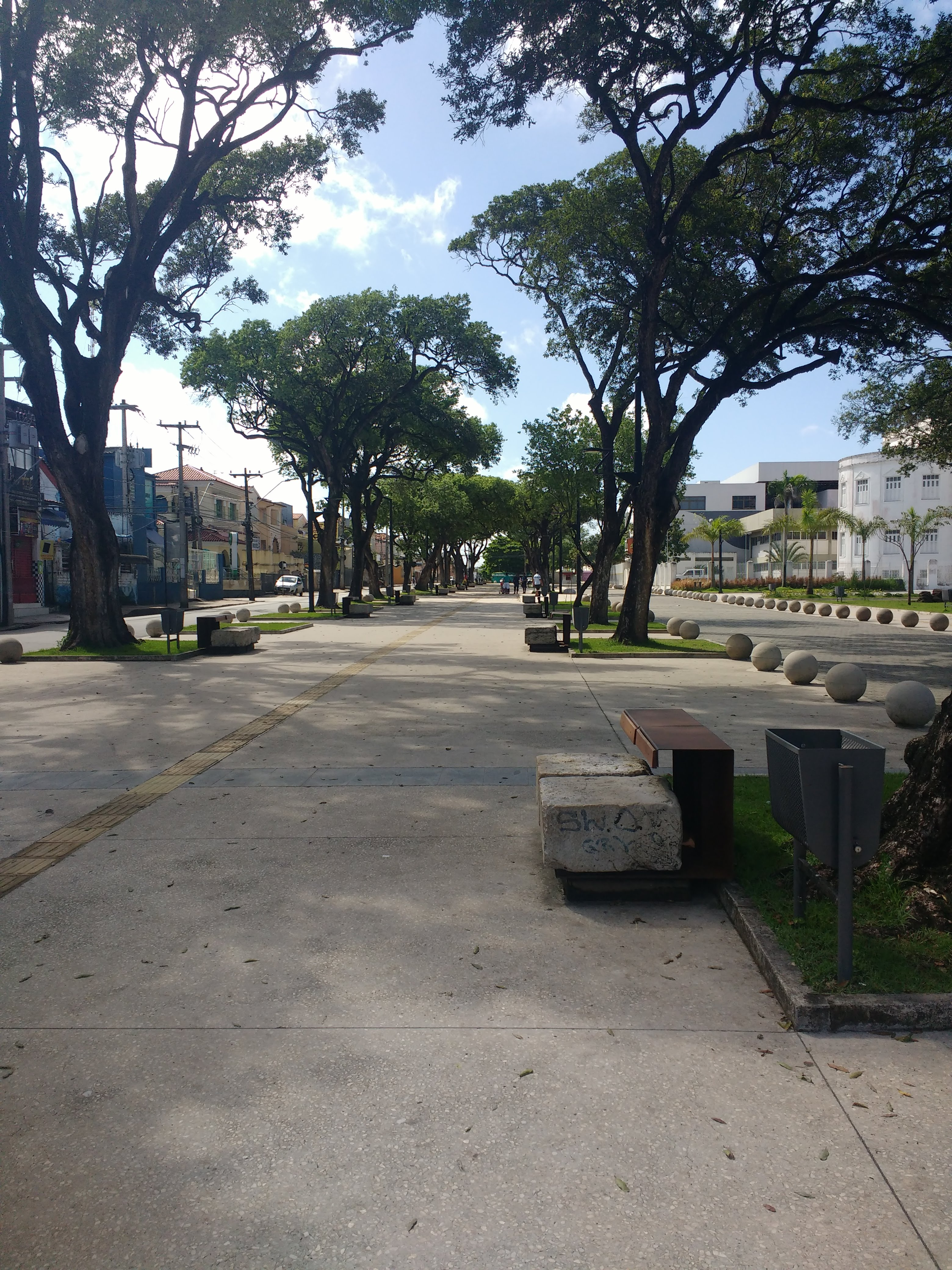 Alameda Silva Maia, com seus oitizeiros centenários, em São Luís (MA)